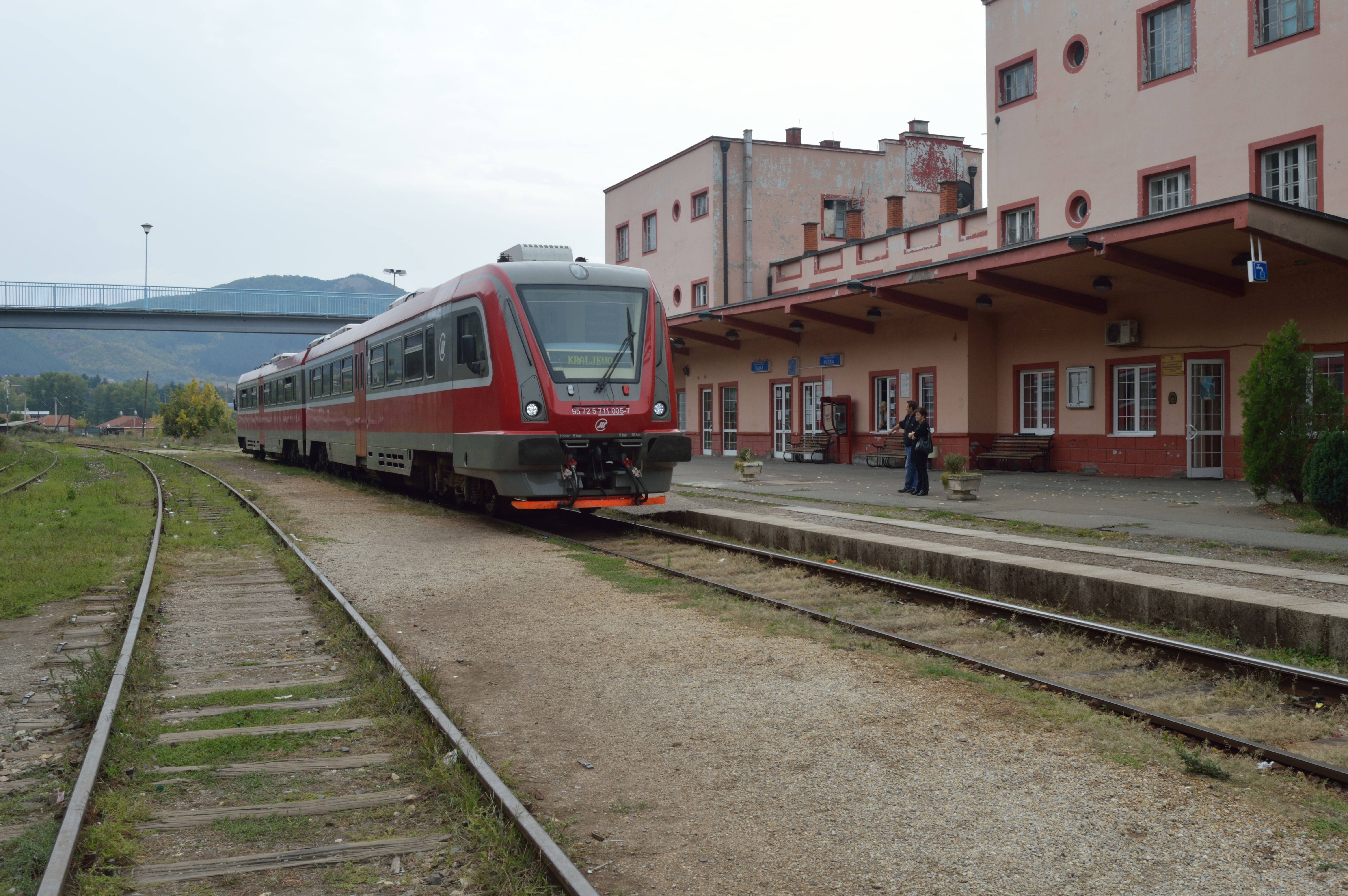 Raška